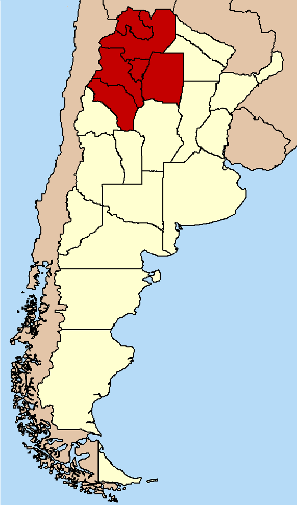 Mapa del NOA